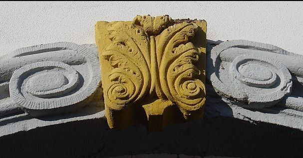 Dirmstein Gasthaus 'Drei König' Torabschluss